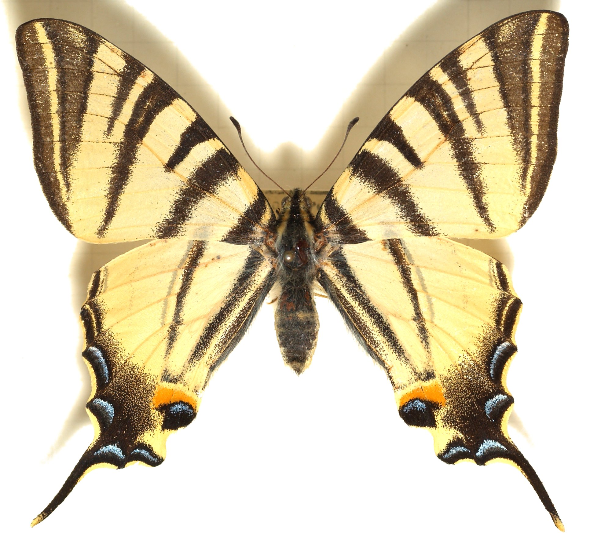 Papilio podalirius or Iphiclides podalirius